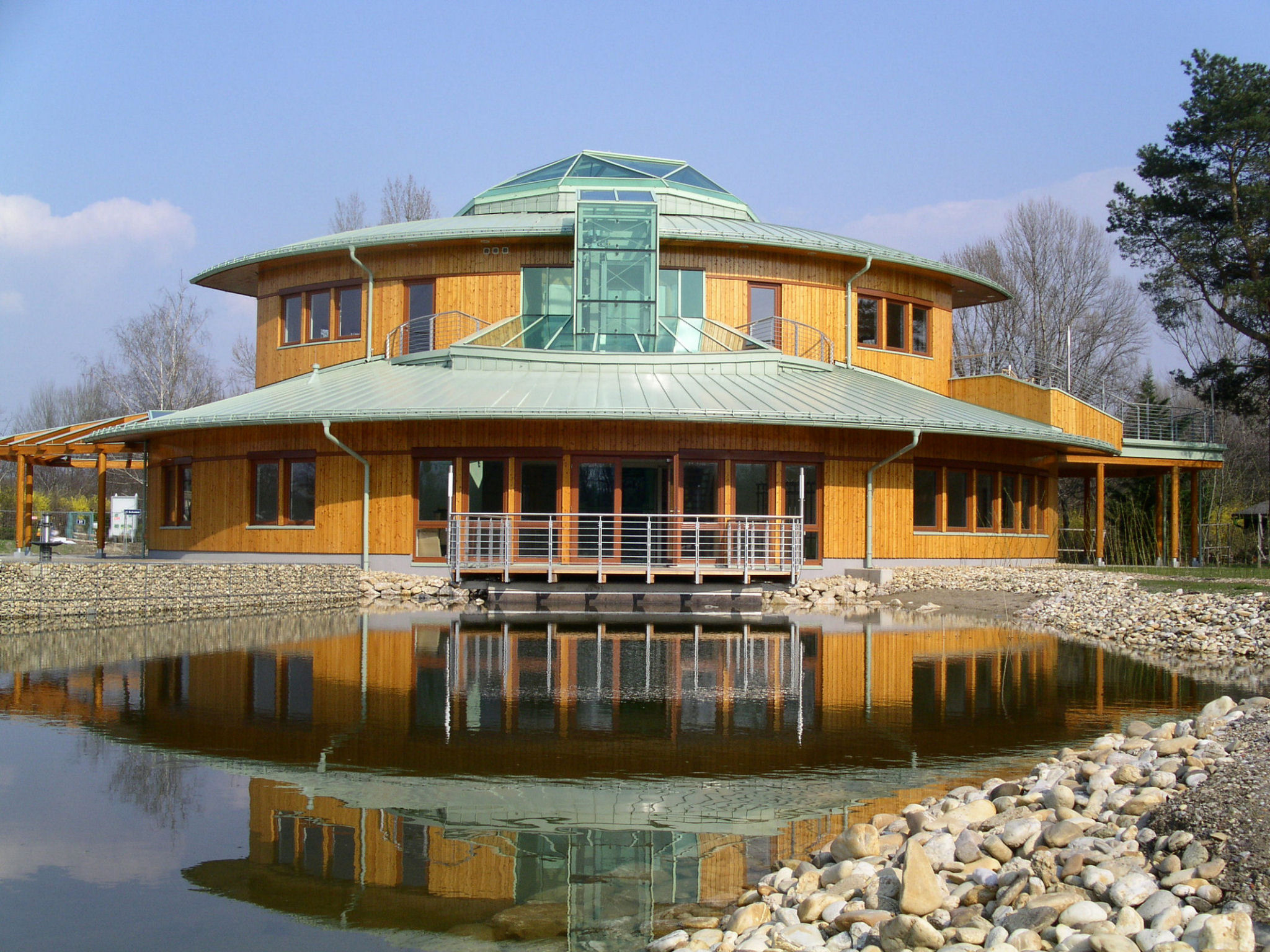 Nationalpark Haus der Lobau